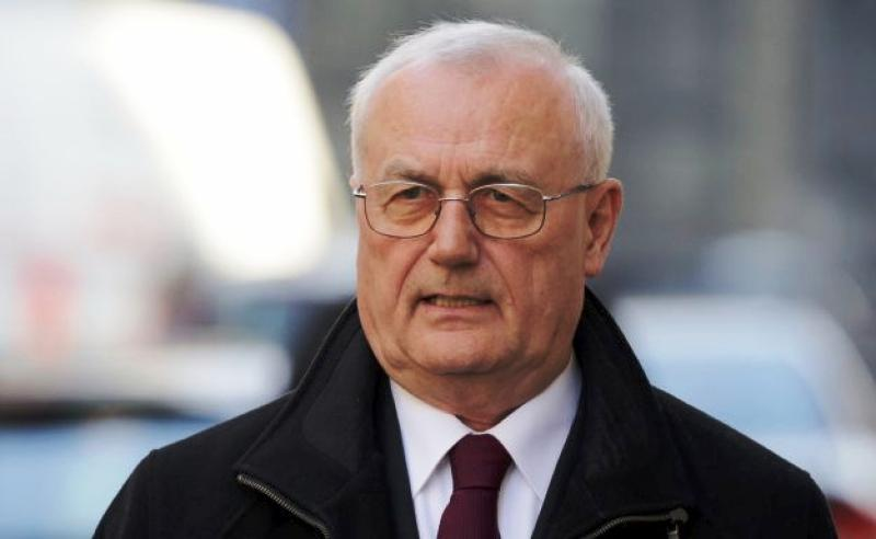 Josip Perkovic